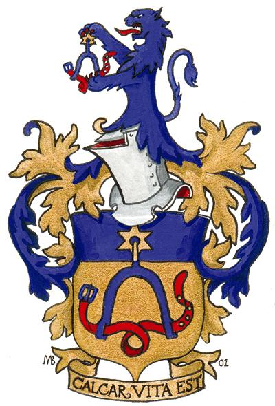 Gyllensporres släktvapen